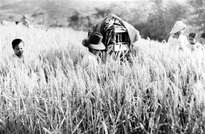 Repronegatif. Upacara "Sedekah" untuk Dewi Sri, sang dewi padi. Sesajian diletakkan di depan sawah/ladang